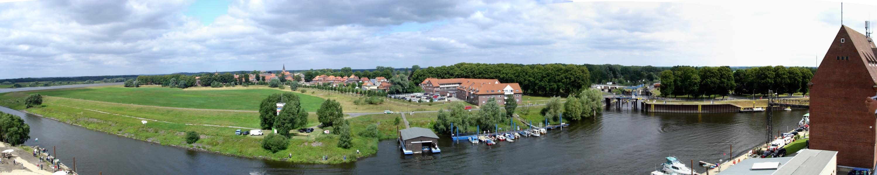 Panorama Dömitz in Mecklenburg-Vorpommern